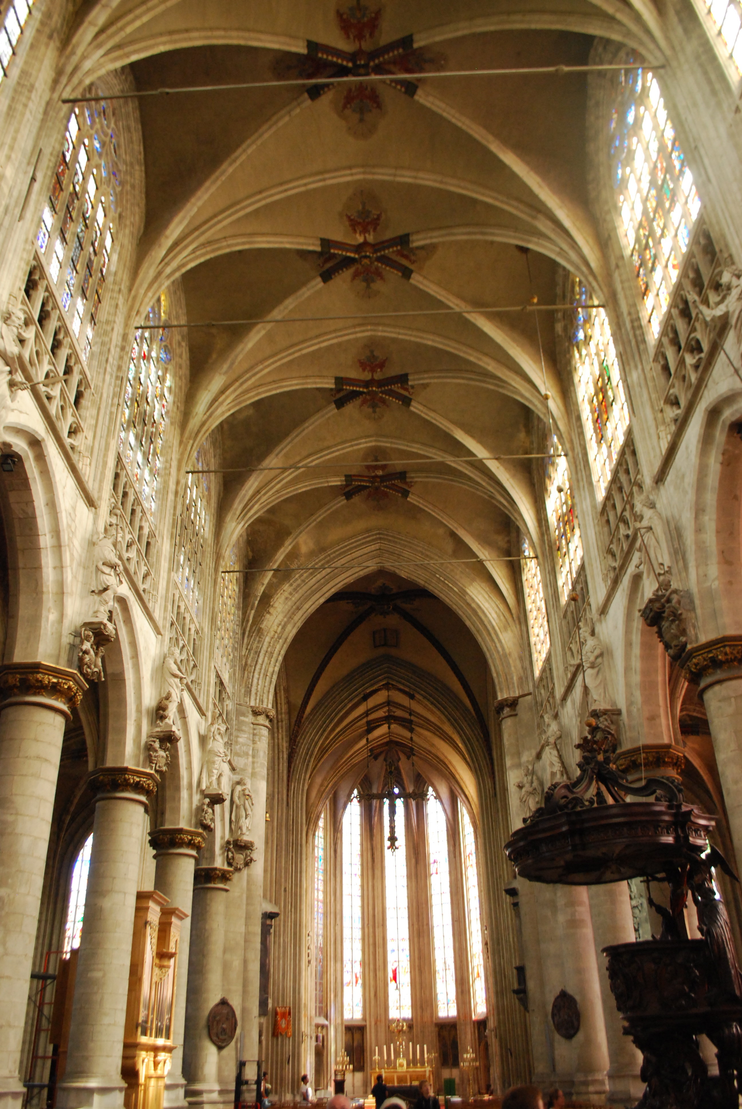 Vue intérieure de l'église Notre-Dame du Sablon à Bruxelles.